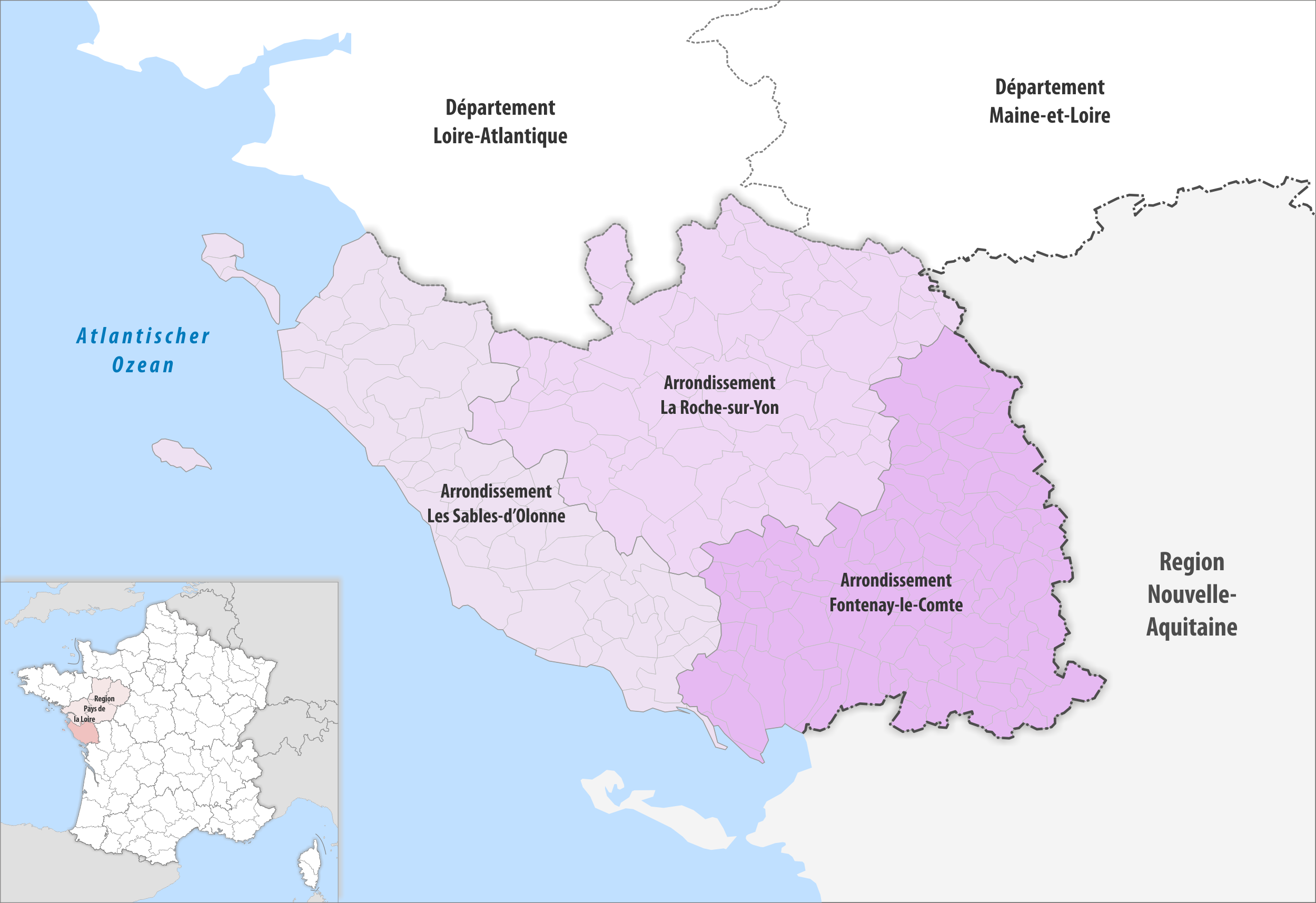 Gemeinden und Arrondissemente im Departement Vendée